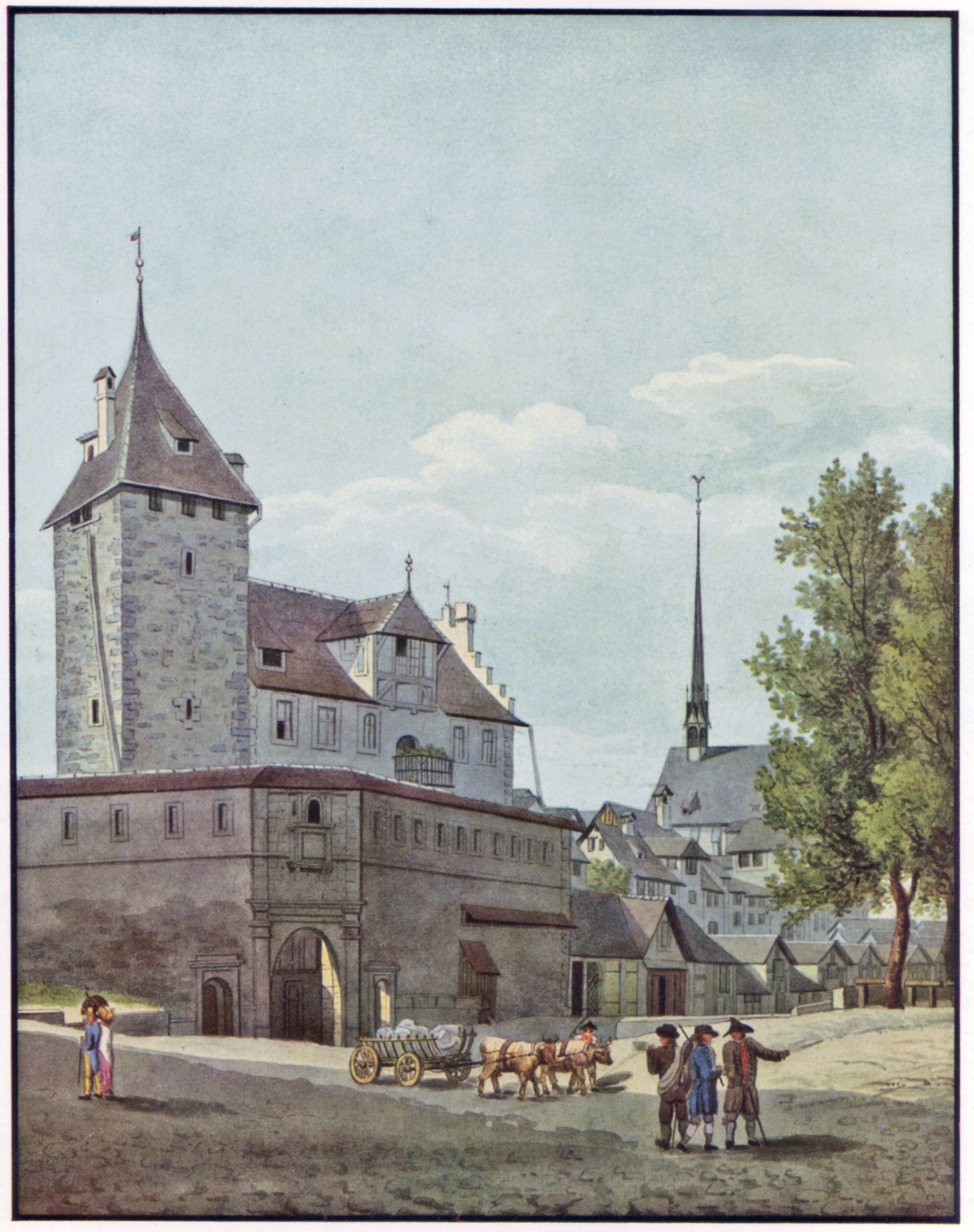 Das Kronen- oder Neumarkttor in Zürich (abgetragen 1827) auf einem Aquarell von Wilhelm Scheuchzer, 1827. Vorne das nachträglich angebaute Vorwerk. Original in der Zentralbibliothek Zürich.